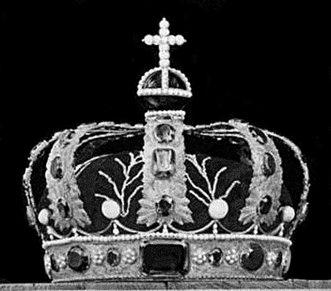 De norske kronregaliene. Dronningkronen. Fotografi av O. Væring. Fra Norsk Folkemuseum